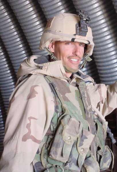 Sgt. 1st Class Paul Ray Smith, Träger der Medal of Honor, Bravo Company, 11th Engineer Battalion, 3rd Infantry Division, U.S. Army